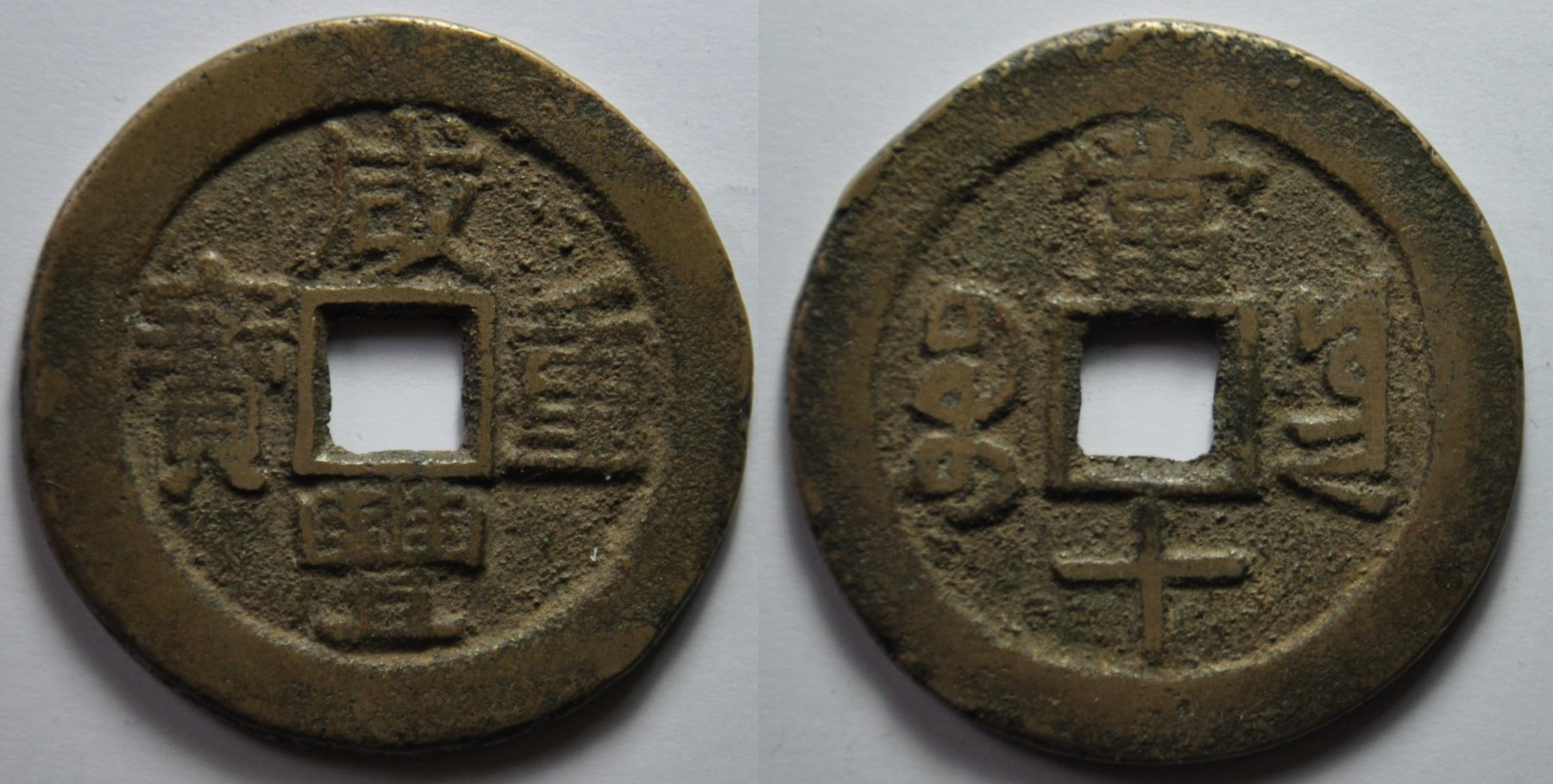 Une monnaie de 10 cash de l'empereur Wen Zong (1851-61), dynastie Qing (1644-1912) du Yunnan. A/ Xian Feng zhong bao (Monnaie lourde de Xian Feng) R/ Bao yun, Dang shi (valeur 10) Poids 15.3 g. Diamètre 40.4 mm Laiton Référence H22.1017